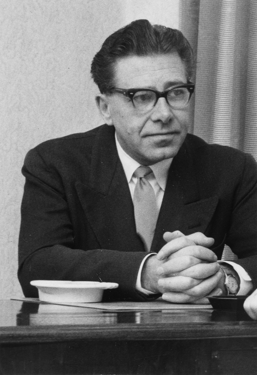 Victor Borg, 1961